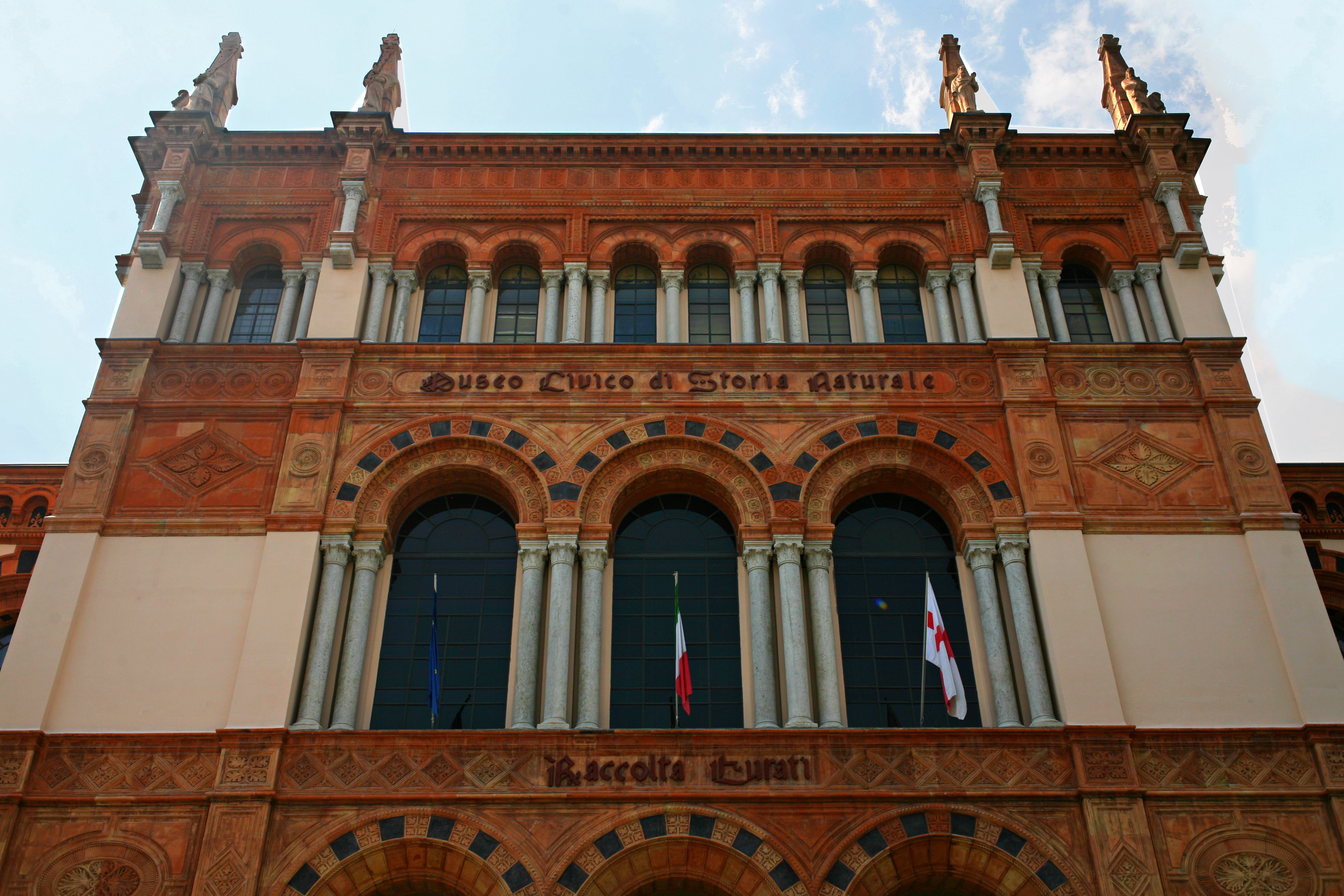 La facciata neoromanica del Museo civico di storia naturale di Milano (1888-1893); architetto Giovanni Ceruti